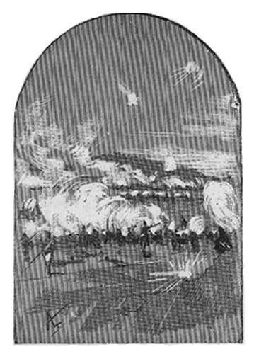 Ilustración de la novela "Napoleón en Chamartín" de Benito Pérez Galdós. Ilustraciones de Mélida y Lizcano, edición La Guirnalda y Episodios Nacionales, 1882.